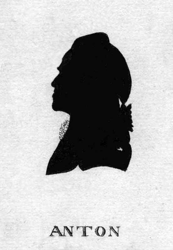 Scherenschnitt Konrad Gottlob Anton , (1745- 1814) Sprachforscher und Orientalist